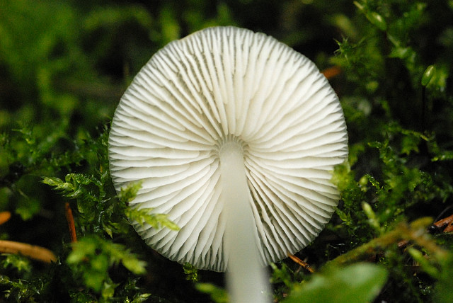 Marasmius wynnei from Commanster, Belgium.